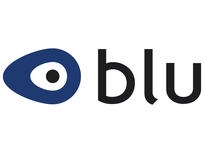 Logo Blu